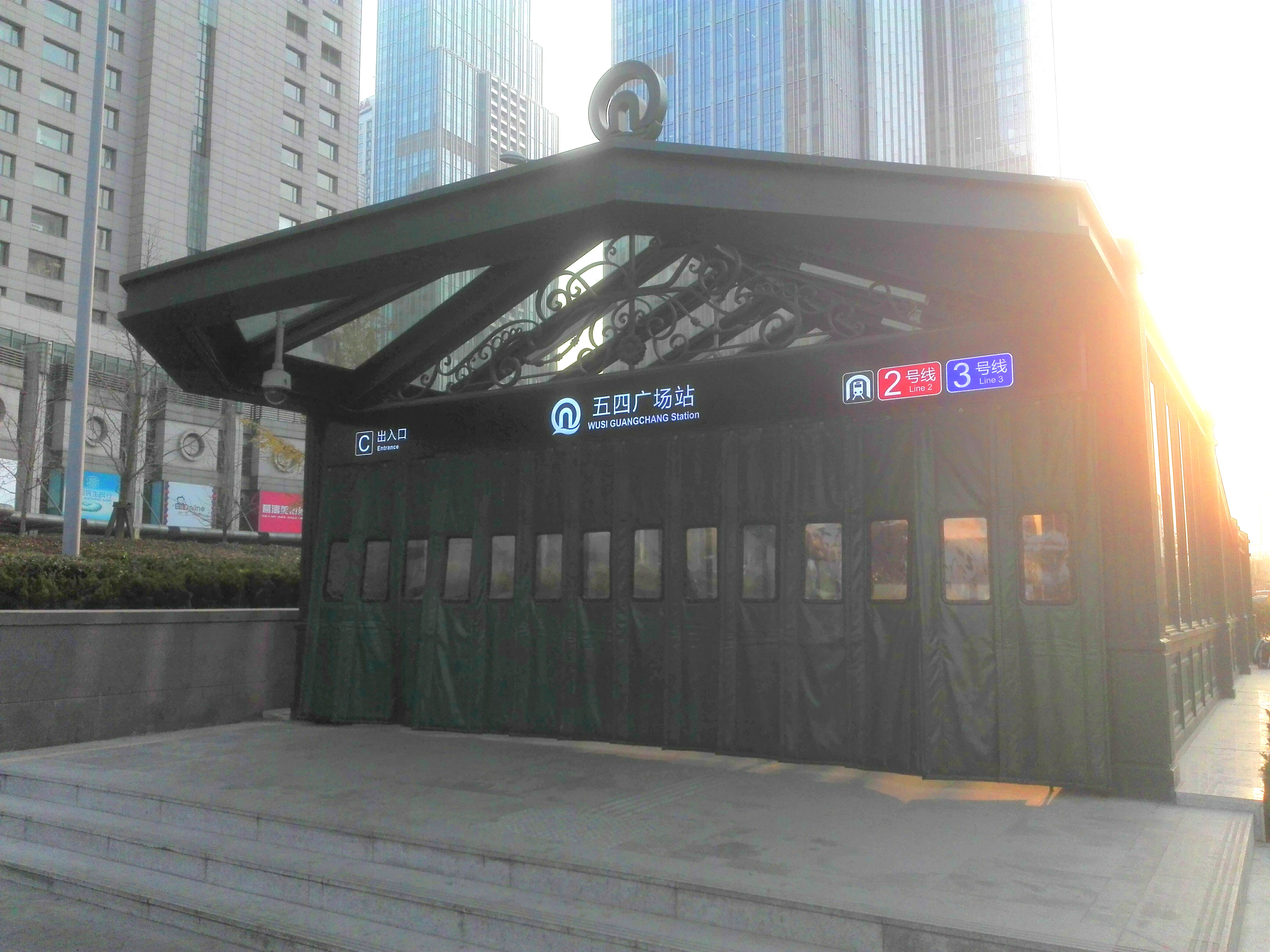 五四广场站C出口